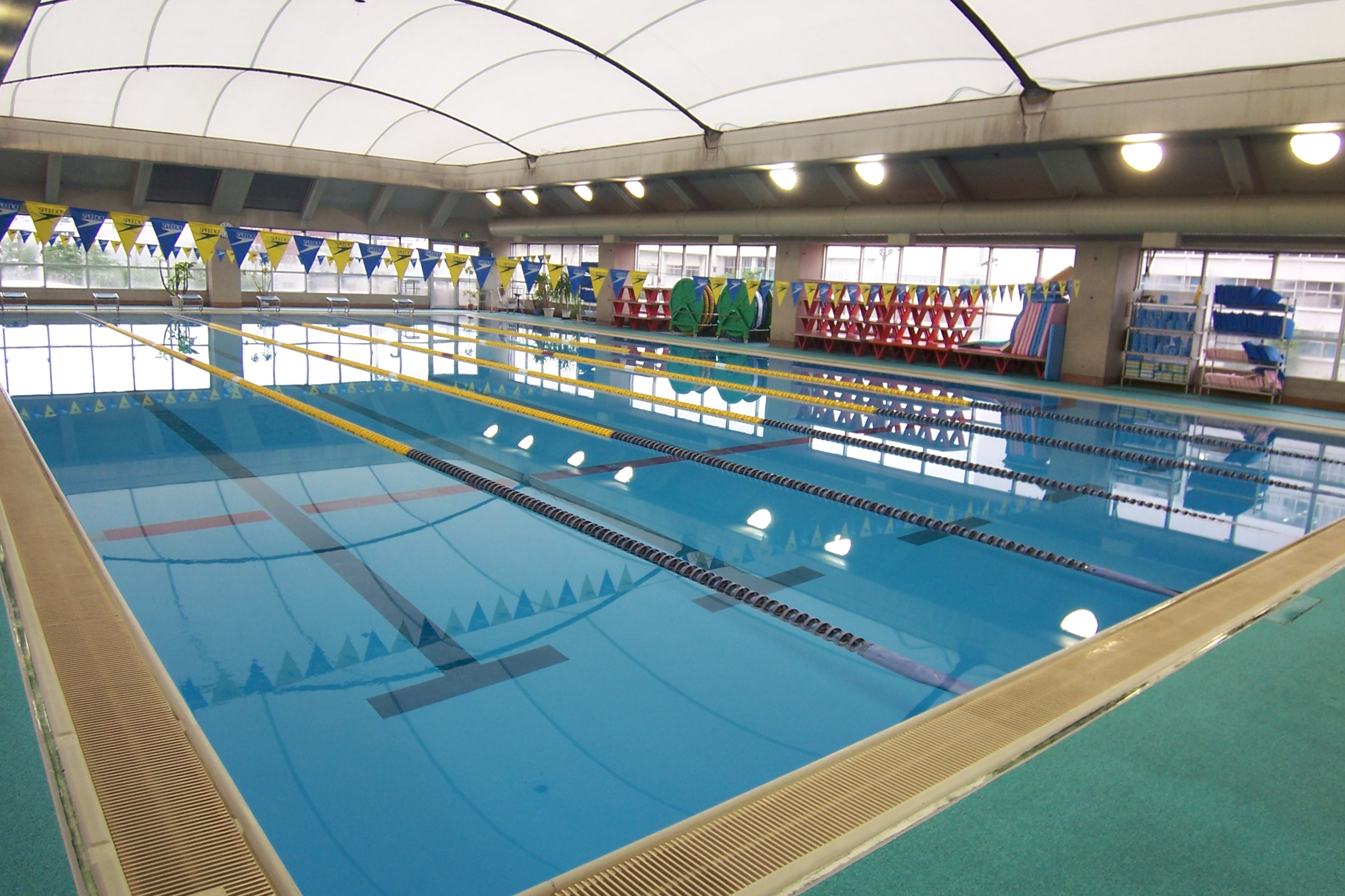 芝浦工業大学中学高等学校のドーム式温水プールを撮影したものです。